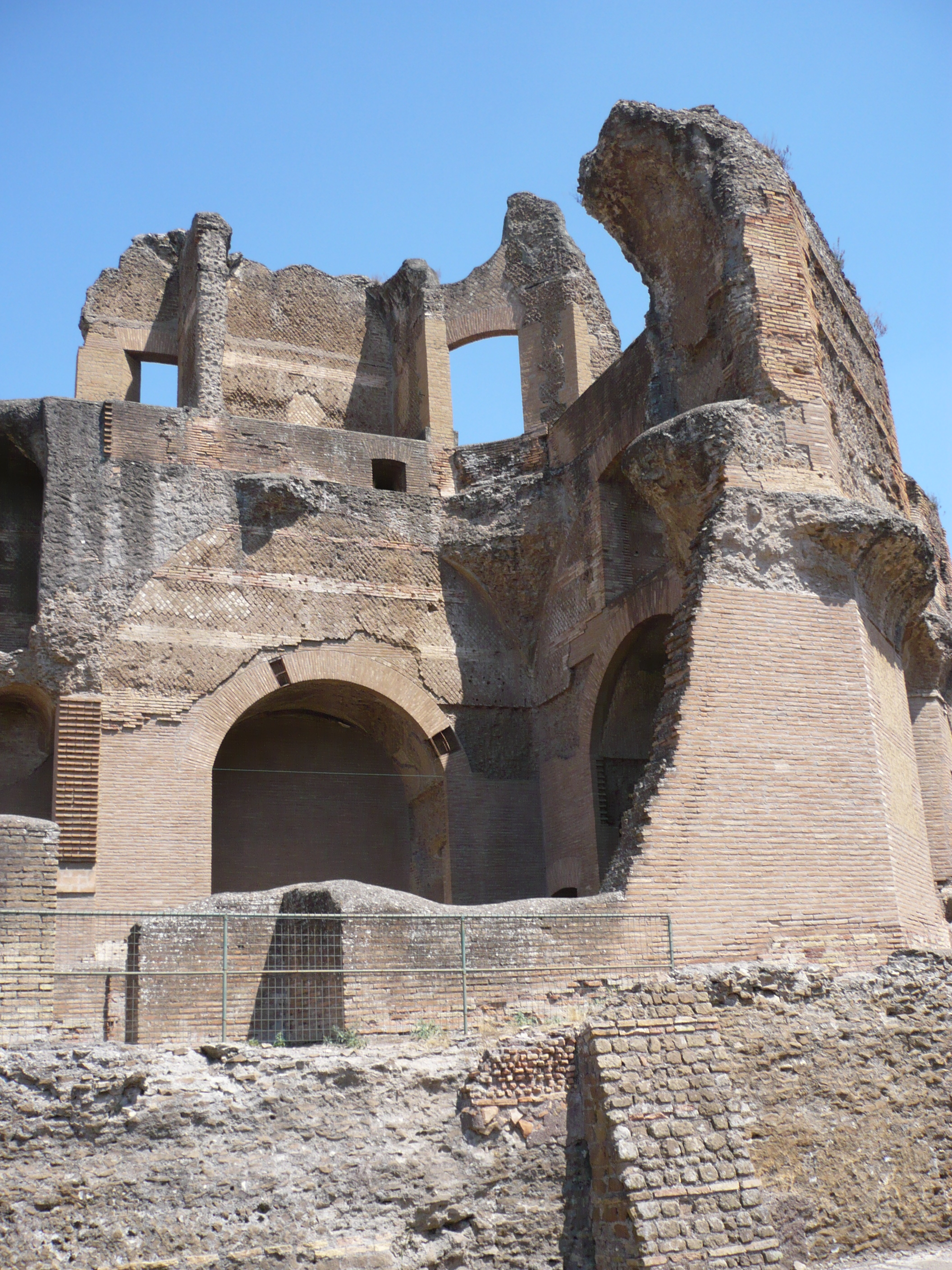 Greek Library